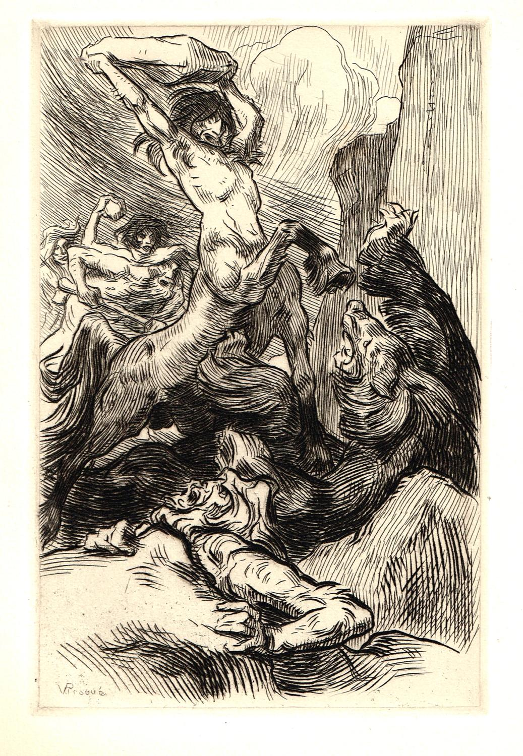 Gravure sur bois et sur cuivre de Victor Prouvé, illustration pour le roman d'André Lichtenberger "Les Centaures" dans la réédition parue chez Georges Crès en 1924. Combat des centaures contre un ours géant.